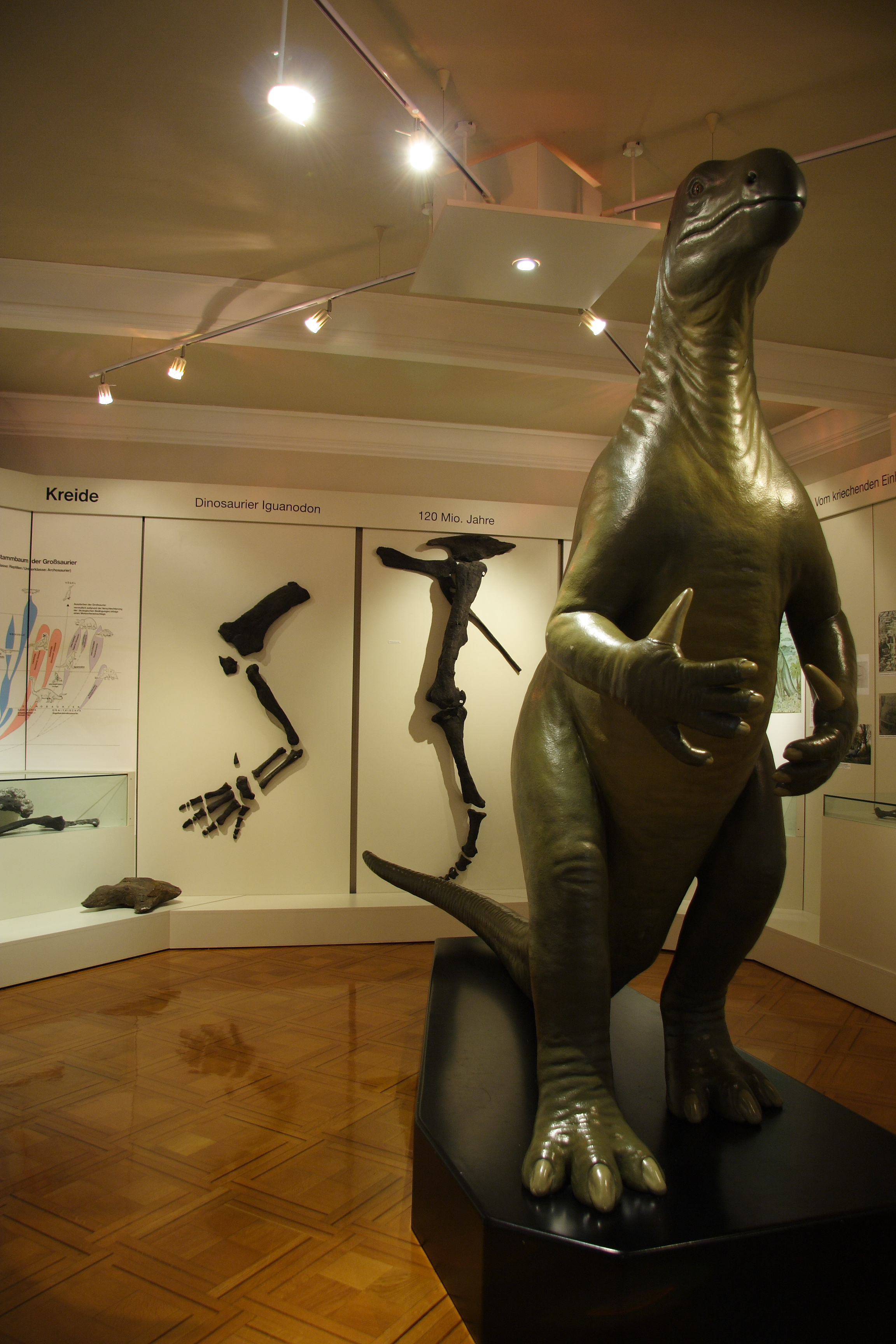 Sauriernachbildung im Stadtmuseum Brilon